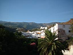 Imagen de Archez